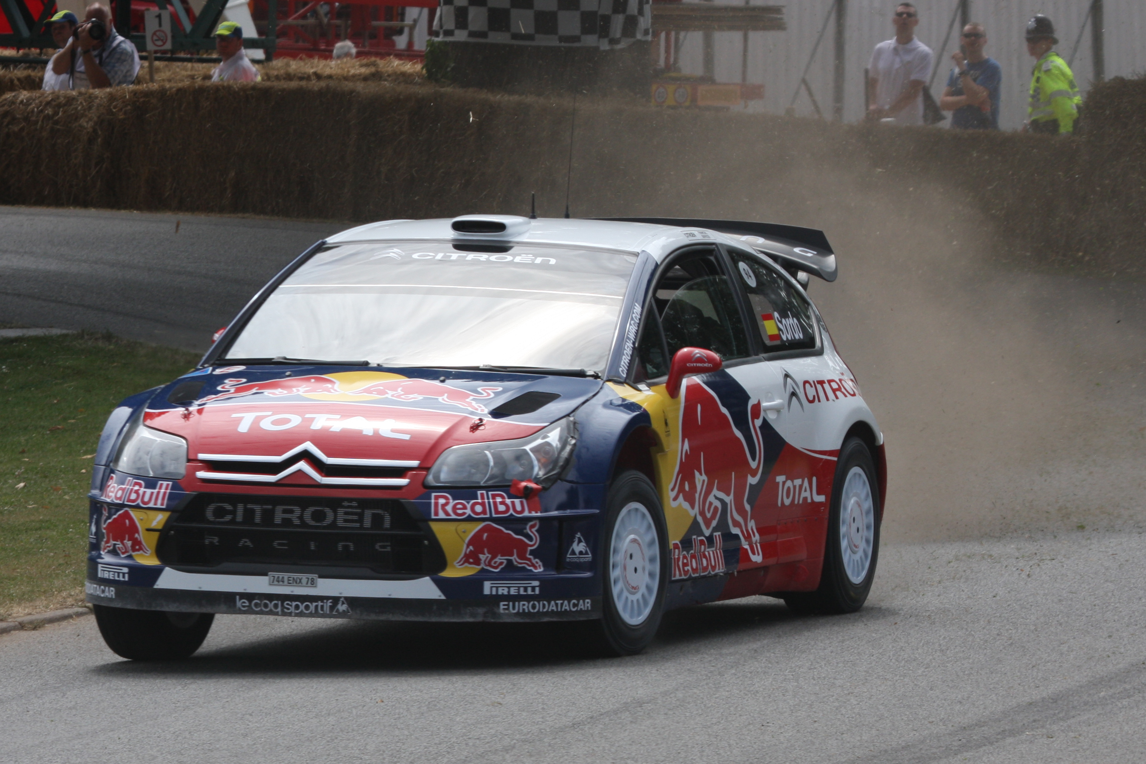 2009 Citroen C4 WRC